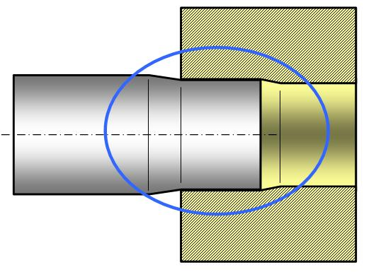 schéma personnel.